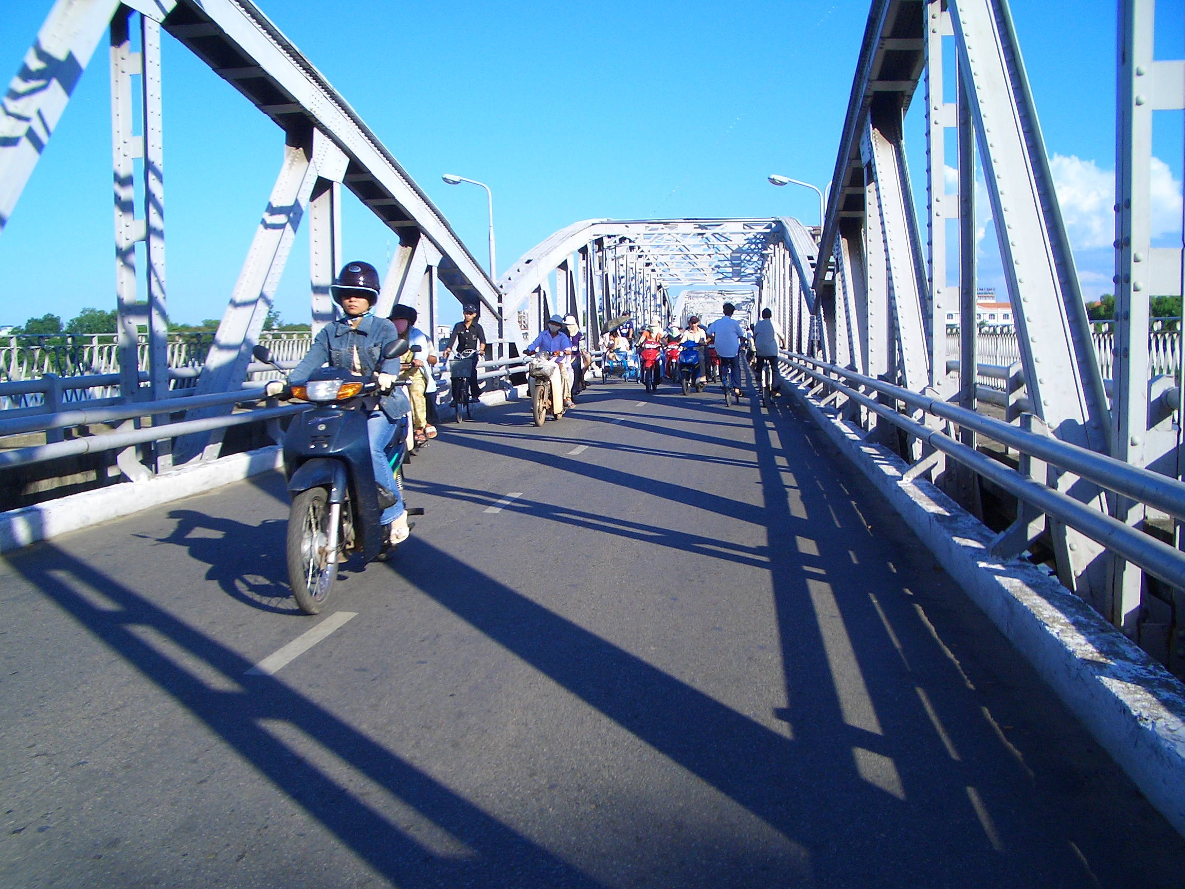 Truong Tien bridge, Hue, Vietnam.